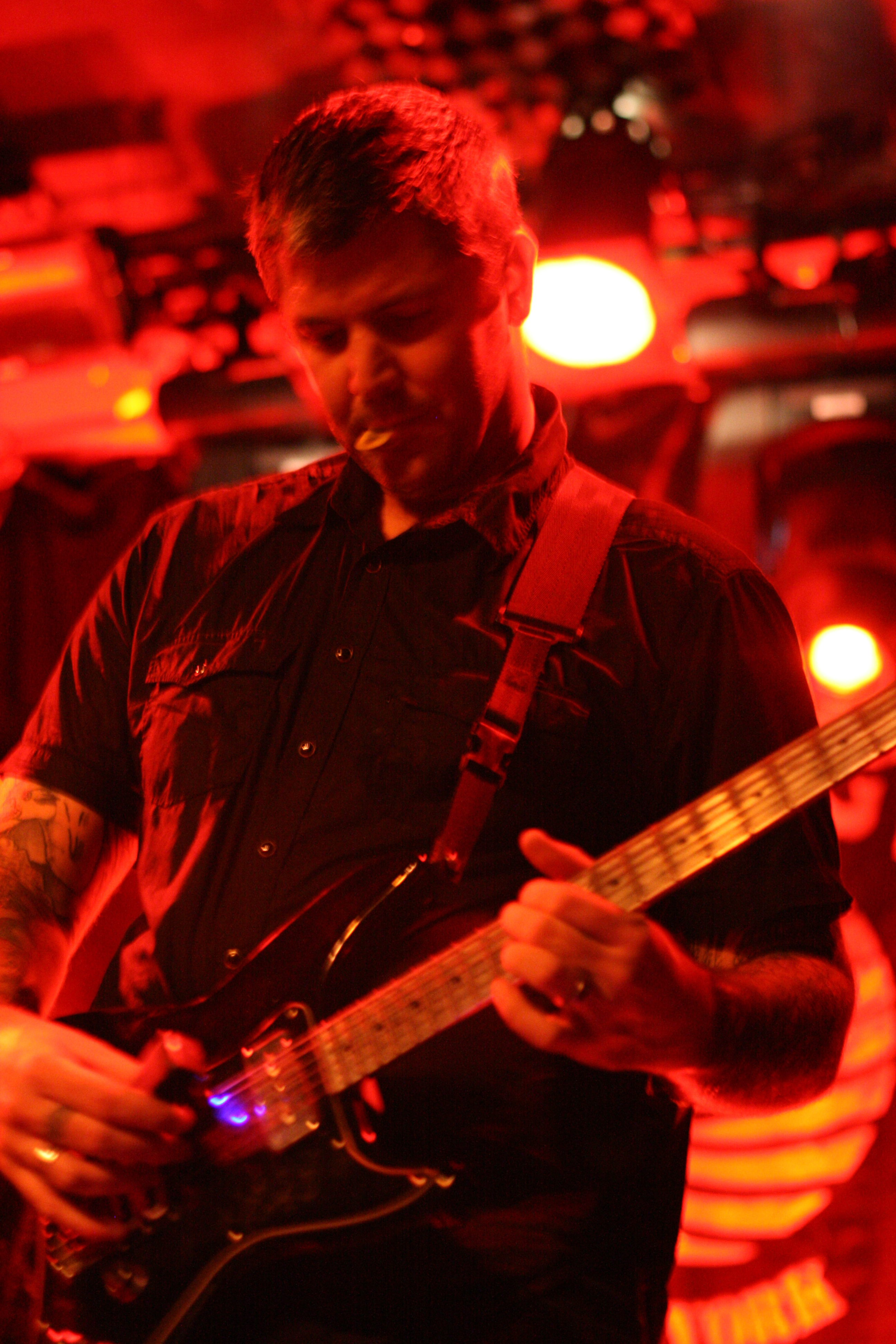 brooklyn vegan party brooklyn vegan party